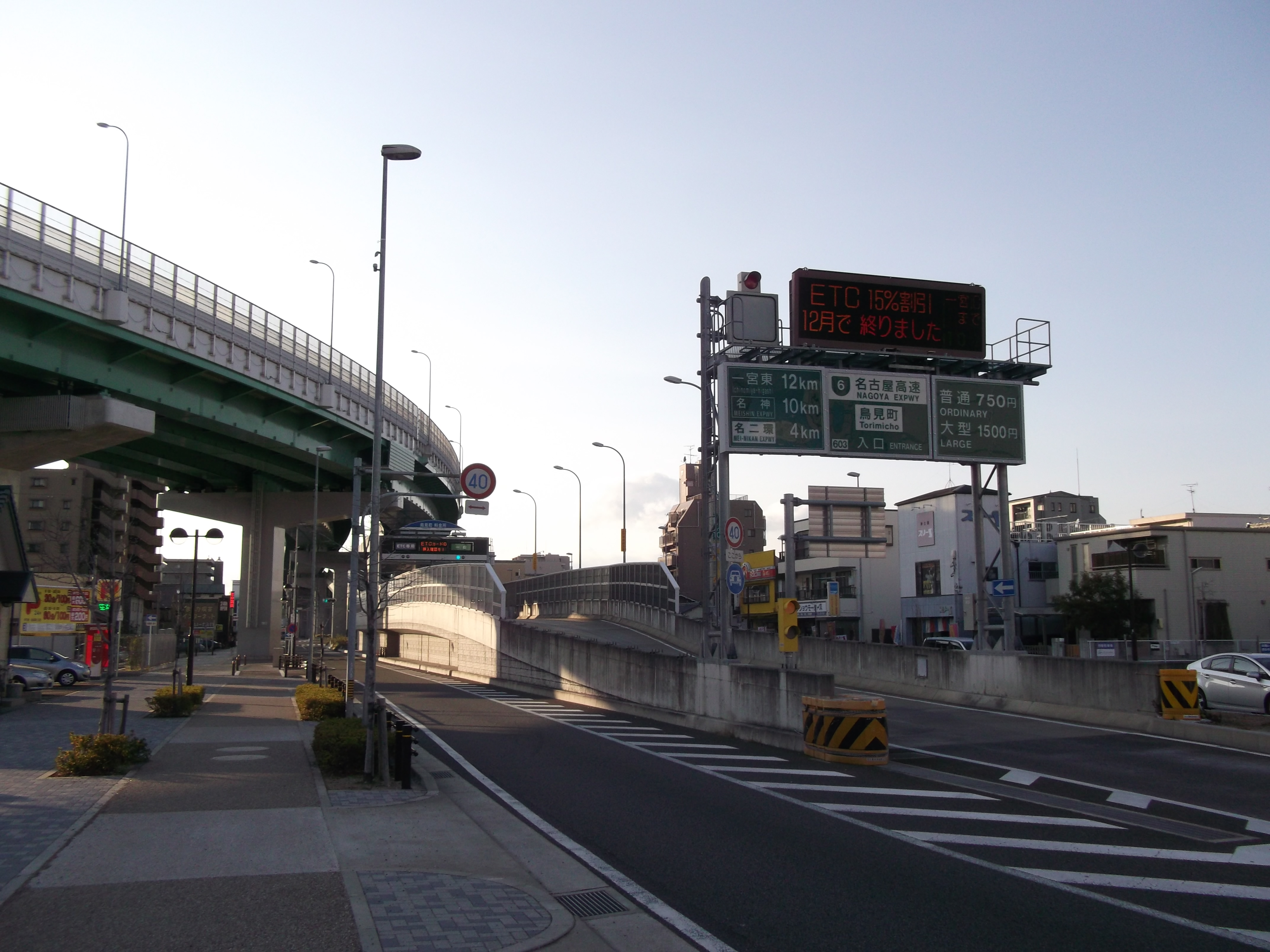 名古屋市西区の名古屋高速清須線鳥見町出入口を南東より撮影